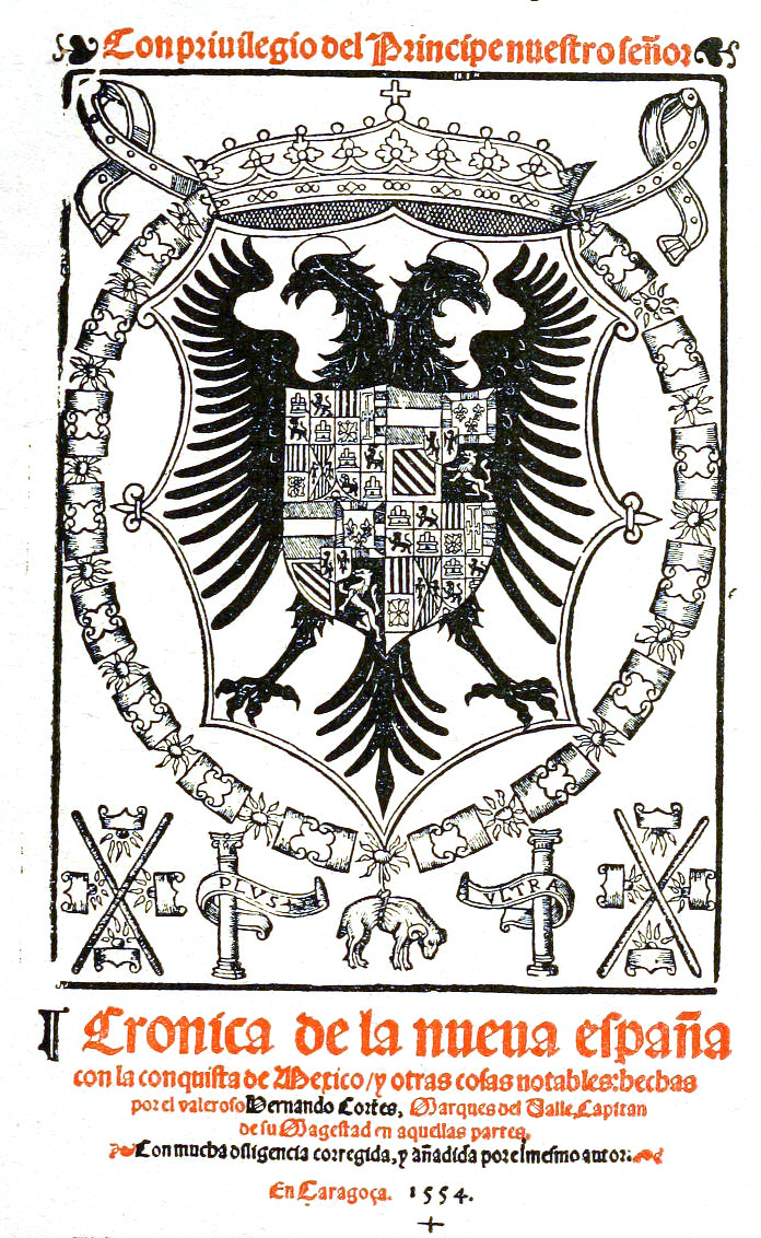 Cover of book by Lopez de Gomara (1555) Con priulegio del Principe nuestro senor por diez anos.